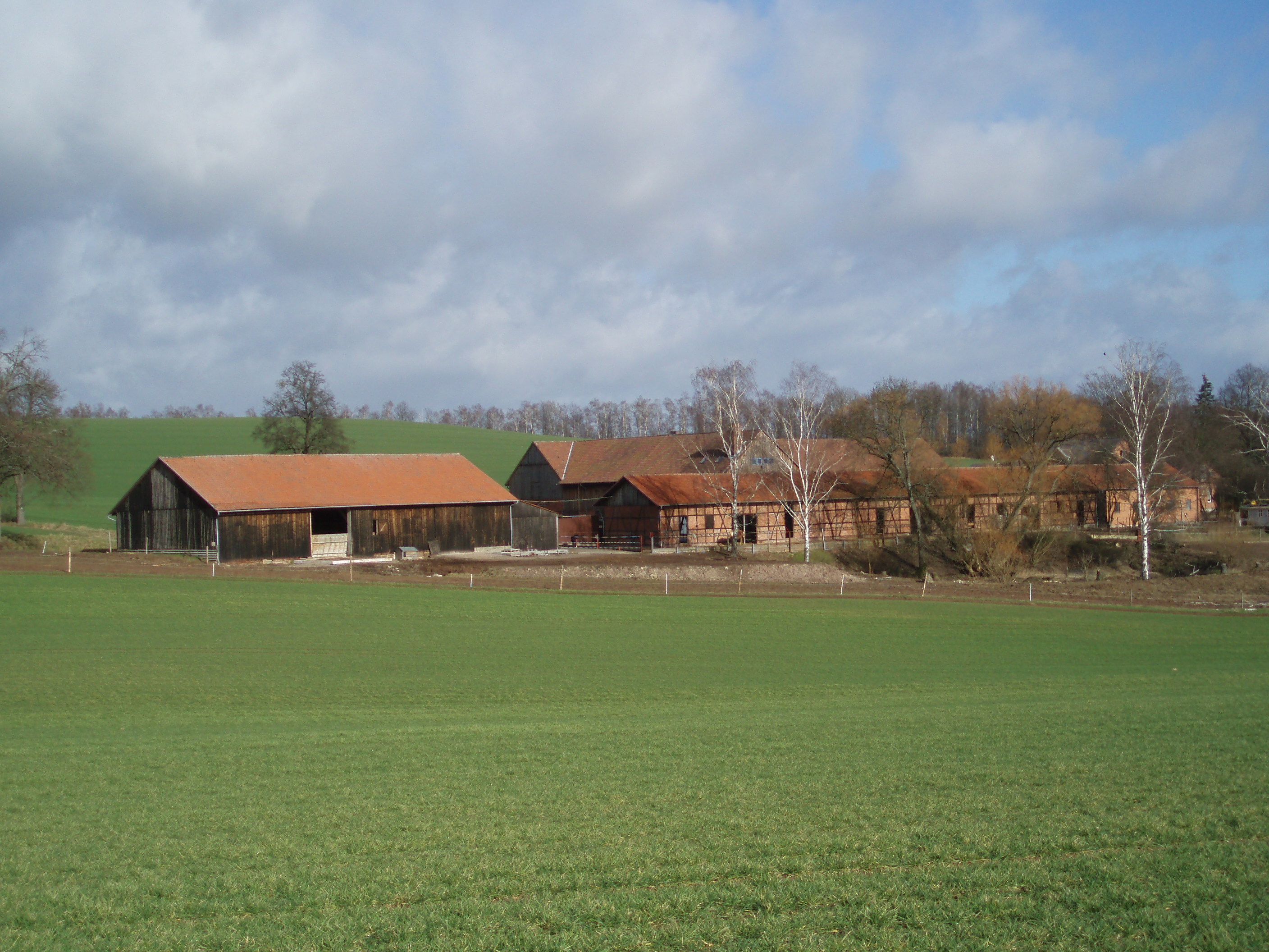 Die Ernstfarm in Coburg-Scheuerfeld, Oberfranken